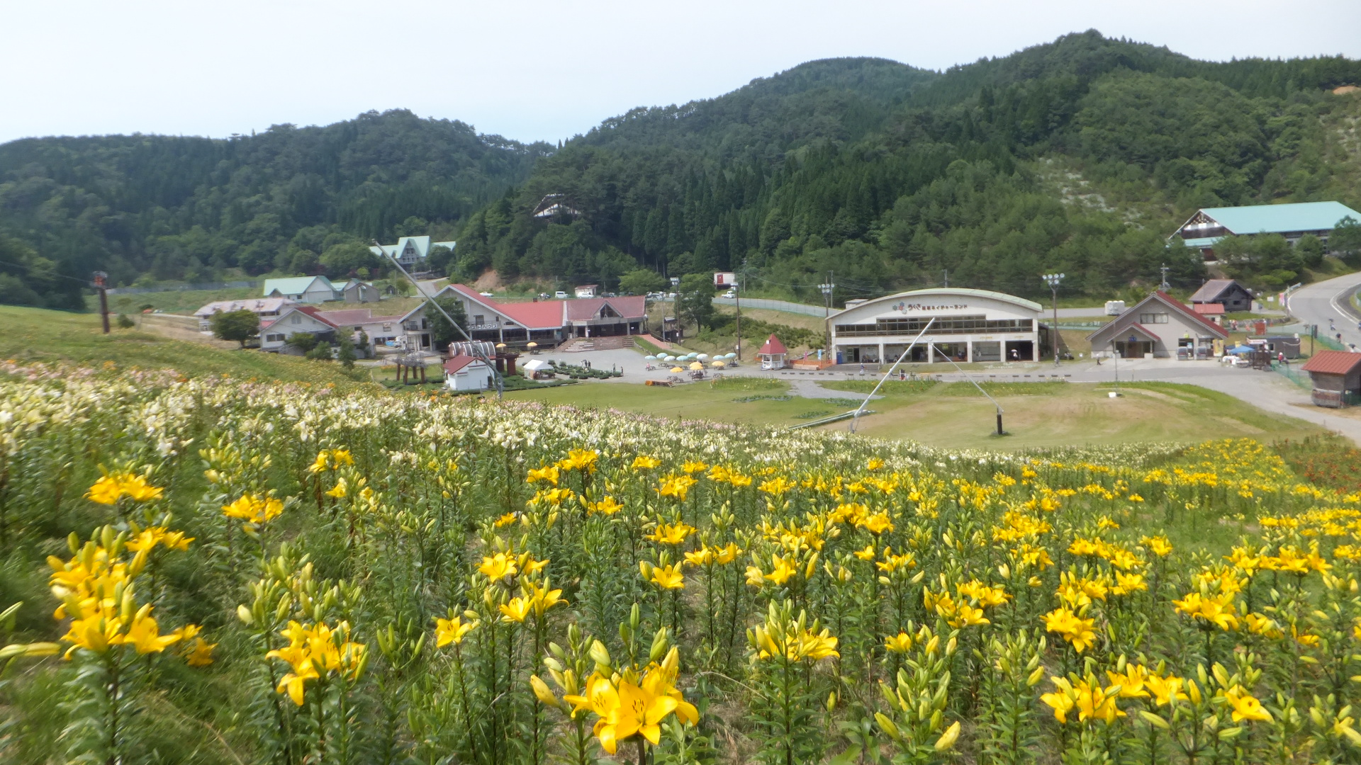 ちくさ高原ゆり園